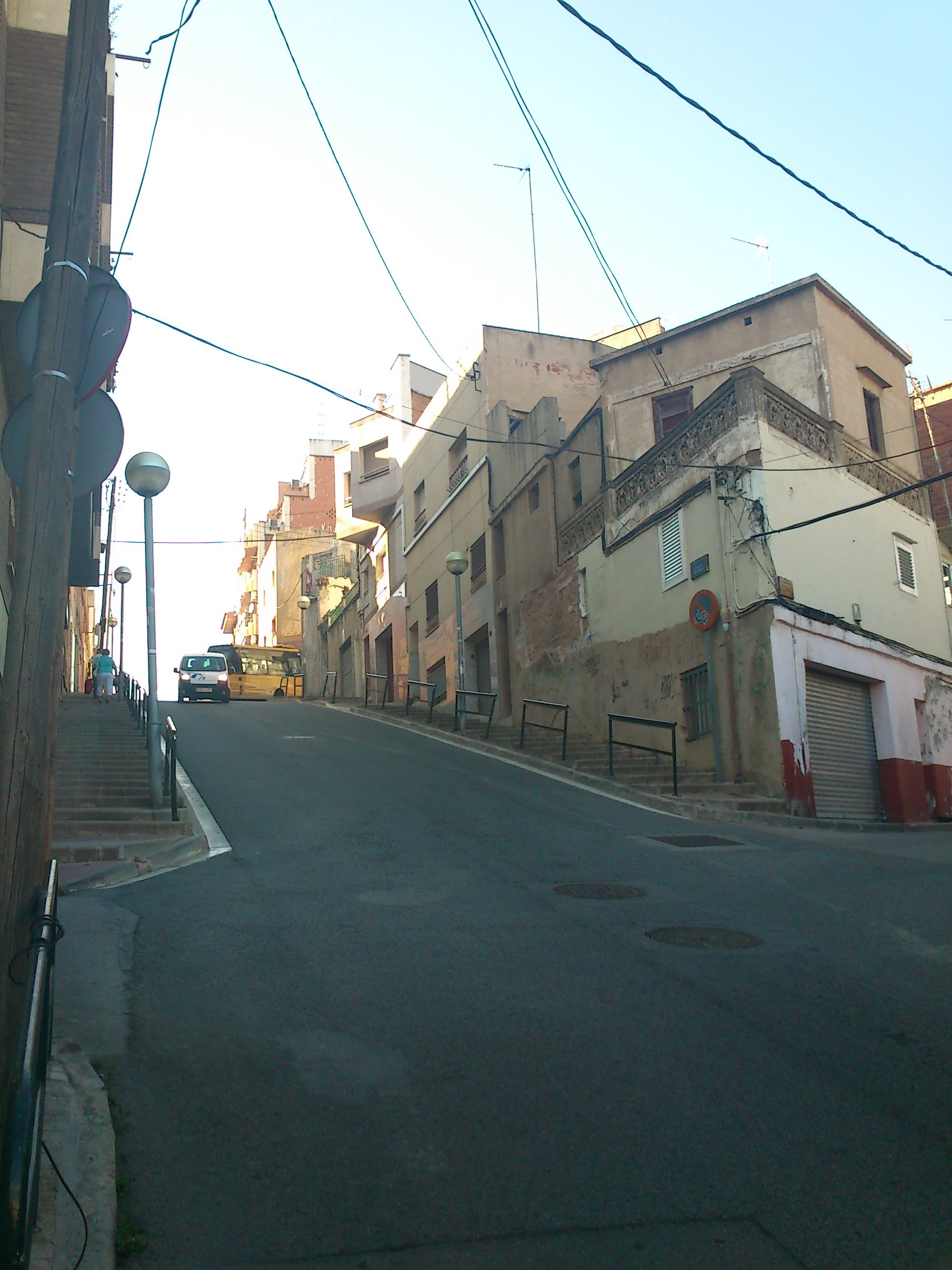 Part alta del carrer de Montserrat del barri de Sant Crist